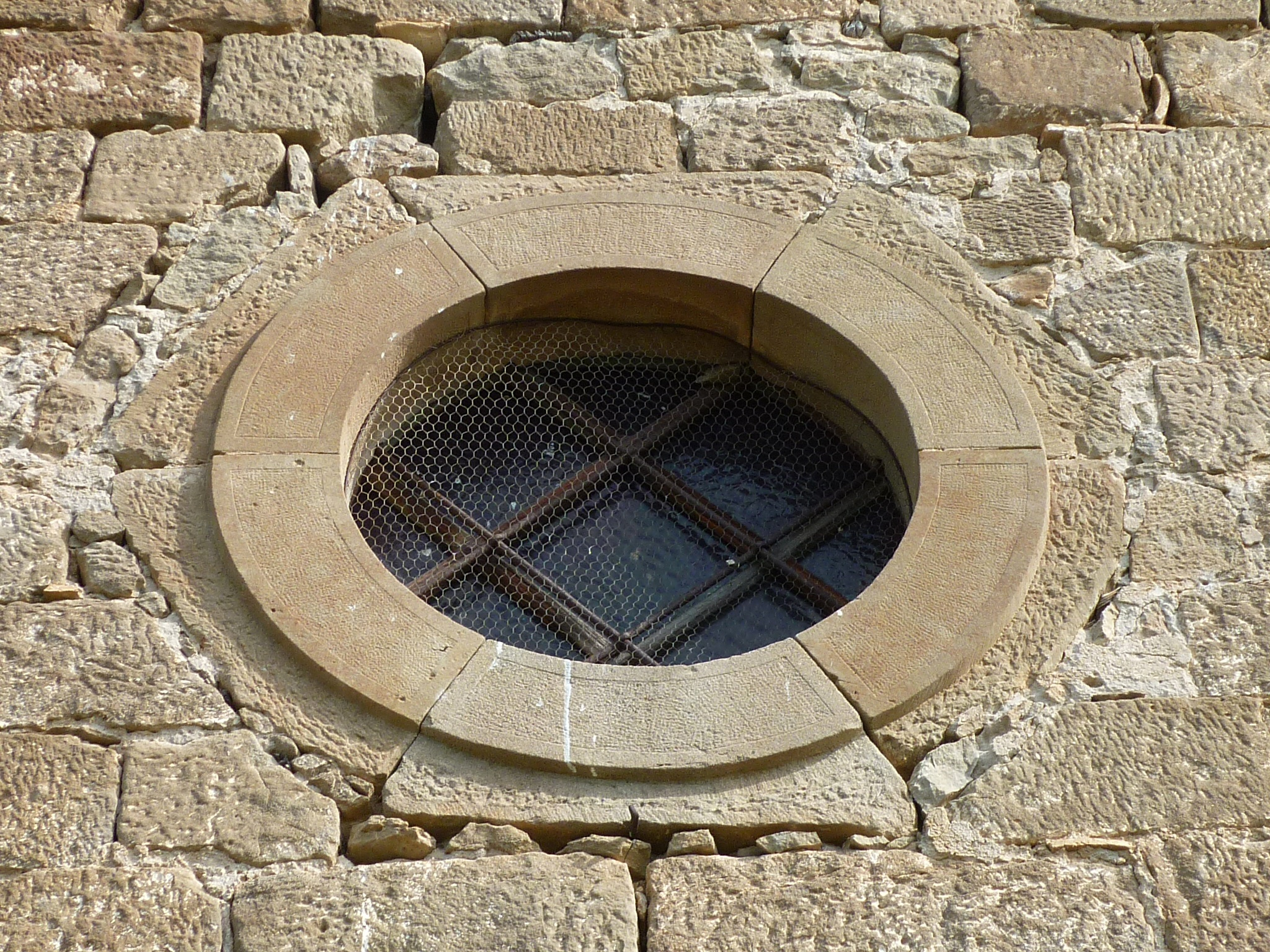 Església de Sant Martí de Joval (Clariana de Cardener): ull de bou